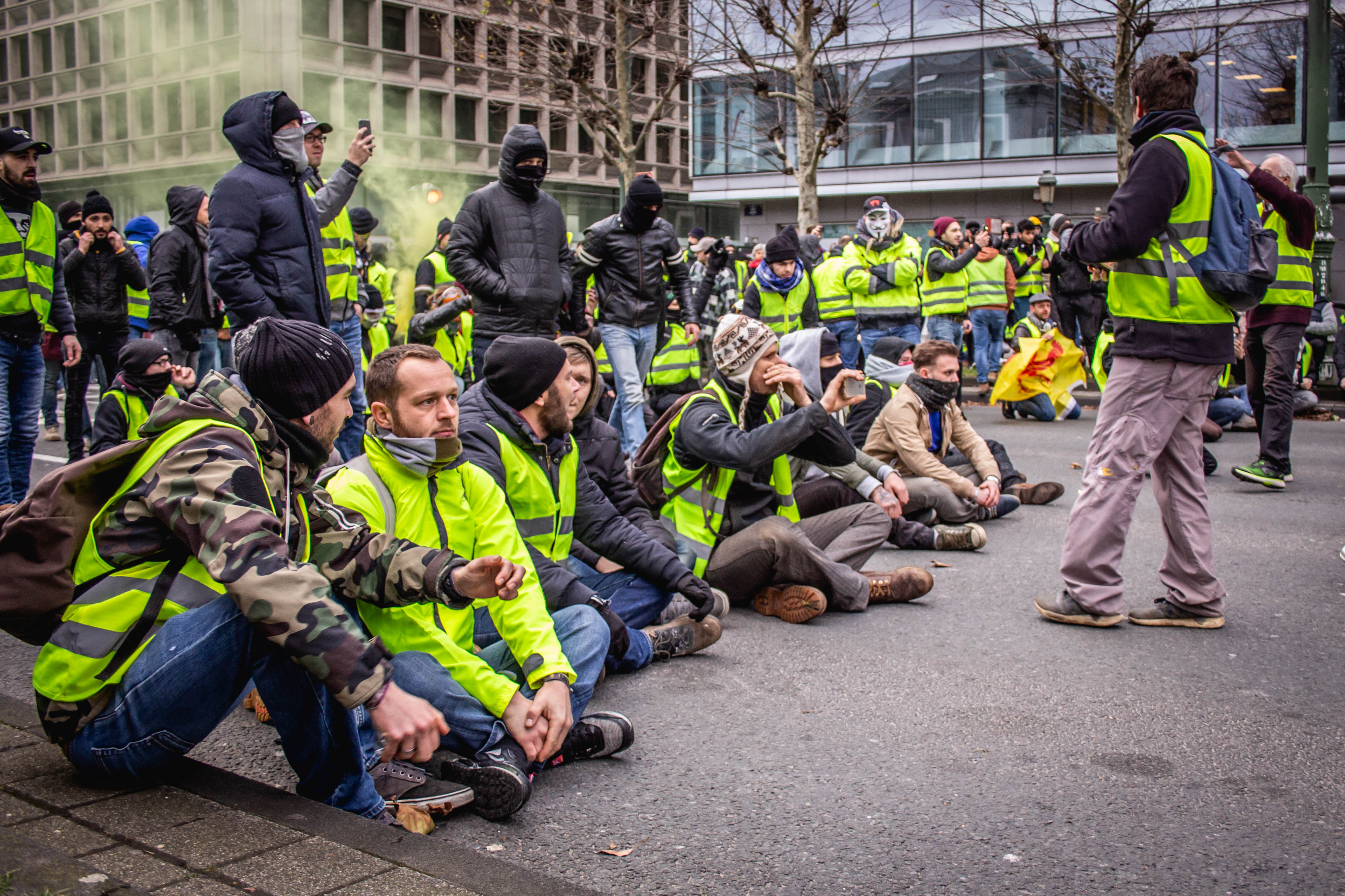 2018-12-08 Gele hesjes Brussel